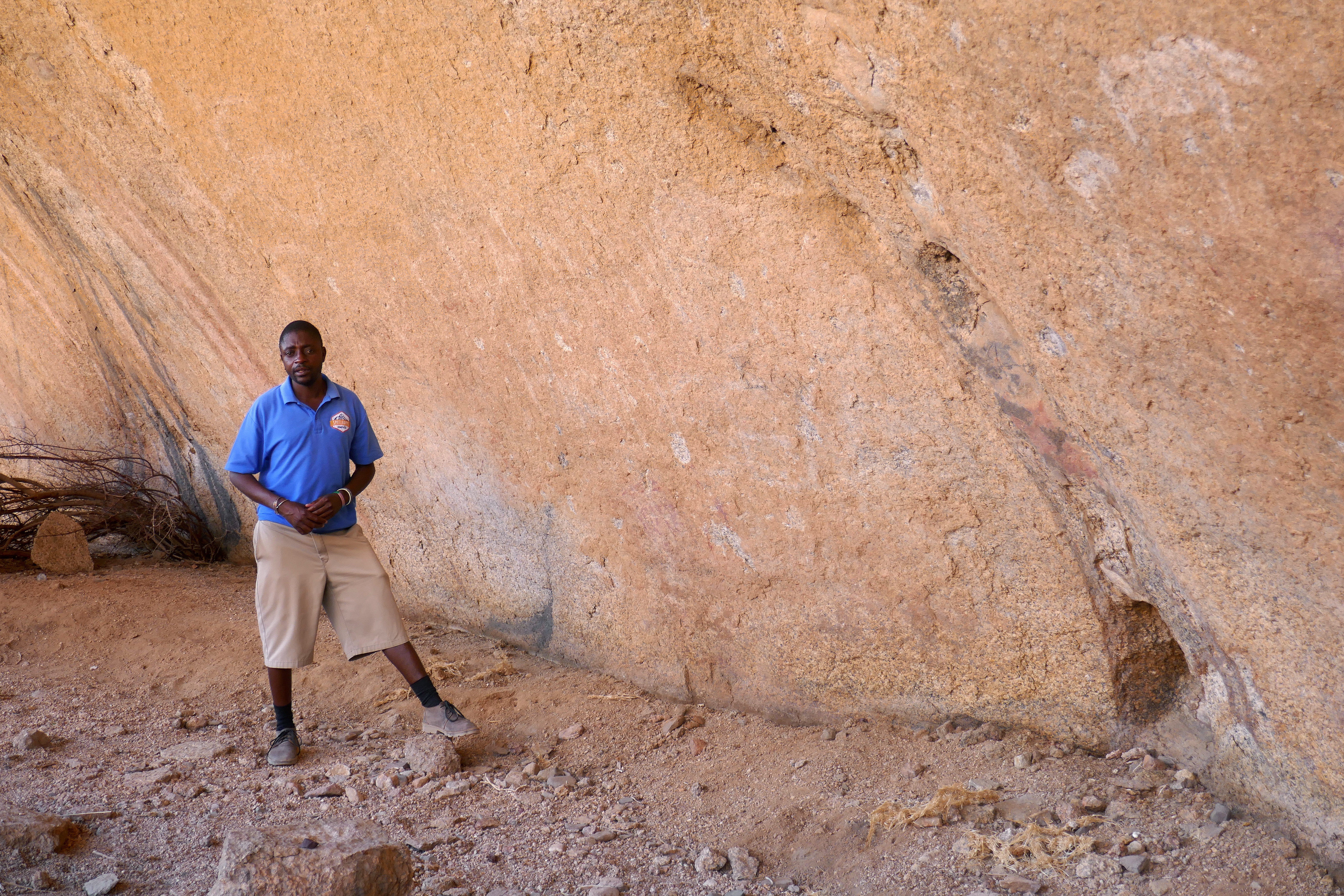 Guide Damara décrivant les peintures rupestres de Bushman's Paradise, dans le Damaraland (Namibie).